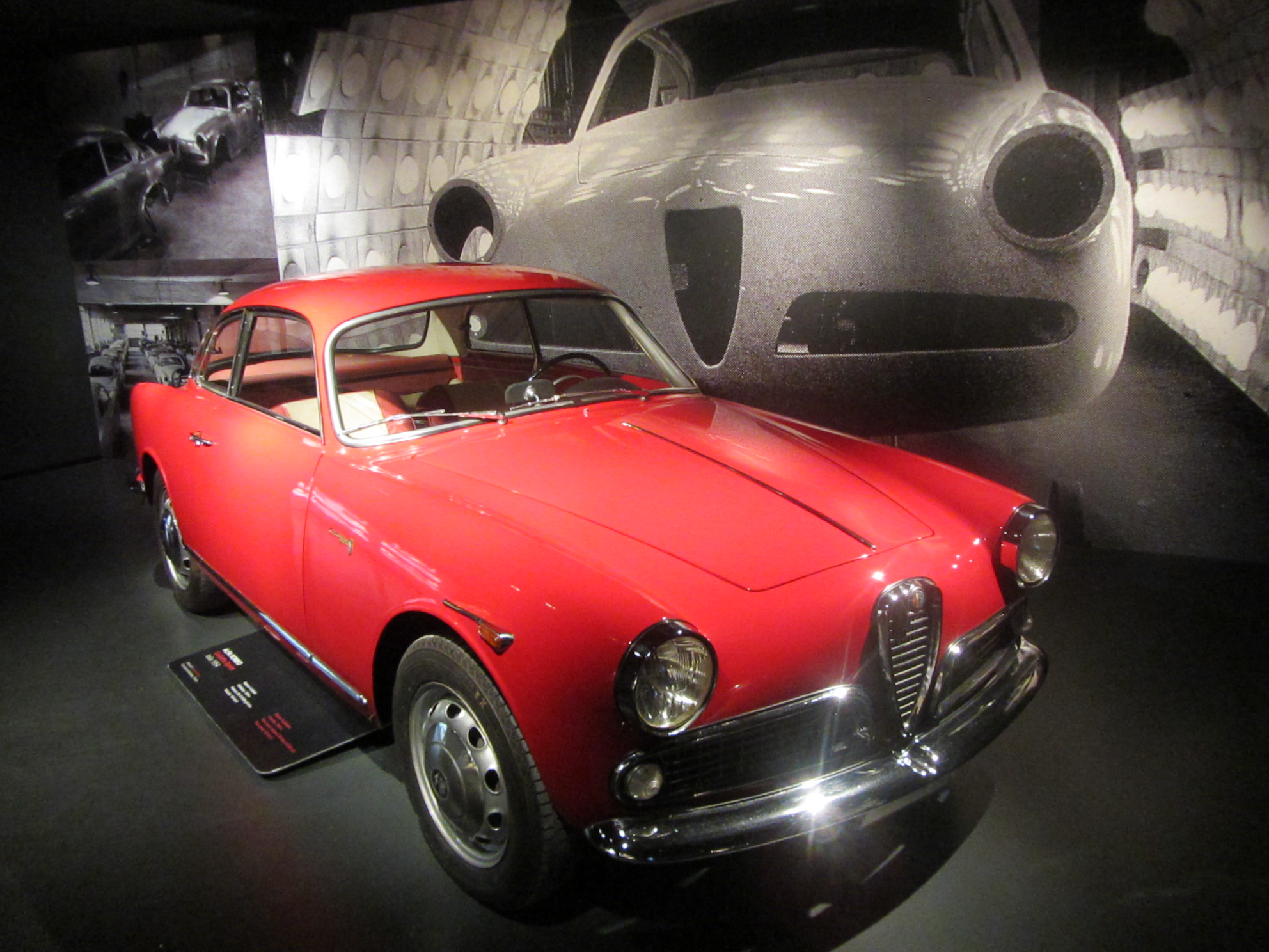 Alfa Romeo Giulietta Sprint e scenografia catena di montaggio al al Museo Nazionale dell'Automobile di Torino (dopo restauro 2011) Dati veicolo: Alfa Romeo Giulietta Sprint - Italia 1954 - Motore 4 cilindri, 1290cc - 80 CV a 6300 giri/min - Velocità Max: 165 km/h donato al Museo Nazionale dell'Automobile di Torino da Carrozzeria Bertone, Torino.